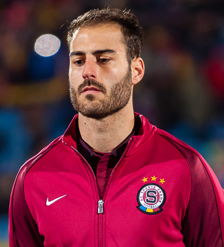 «Ростов» - «Спарта» (16.02.2017)